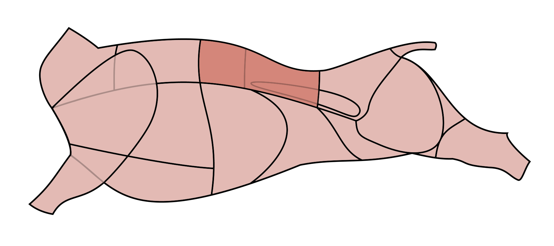 Roastbeef oder Zwischenrippenstück vom Rind.